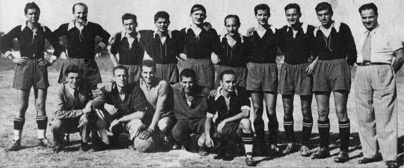 The first-team squad of A.C. Cesena in the 1940–41 season. From left to right, standing: Castagnoli, Pantani (I), Casali, Bonci (II), Pantani (III), Silvestri, Tubi, Turci, Pineroli, Piraccini; crouched: Dradi, Tiboni, Fabbri, Pasolini, Rocchi.